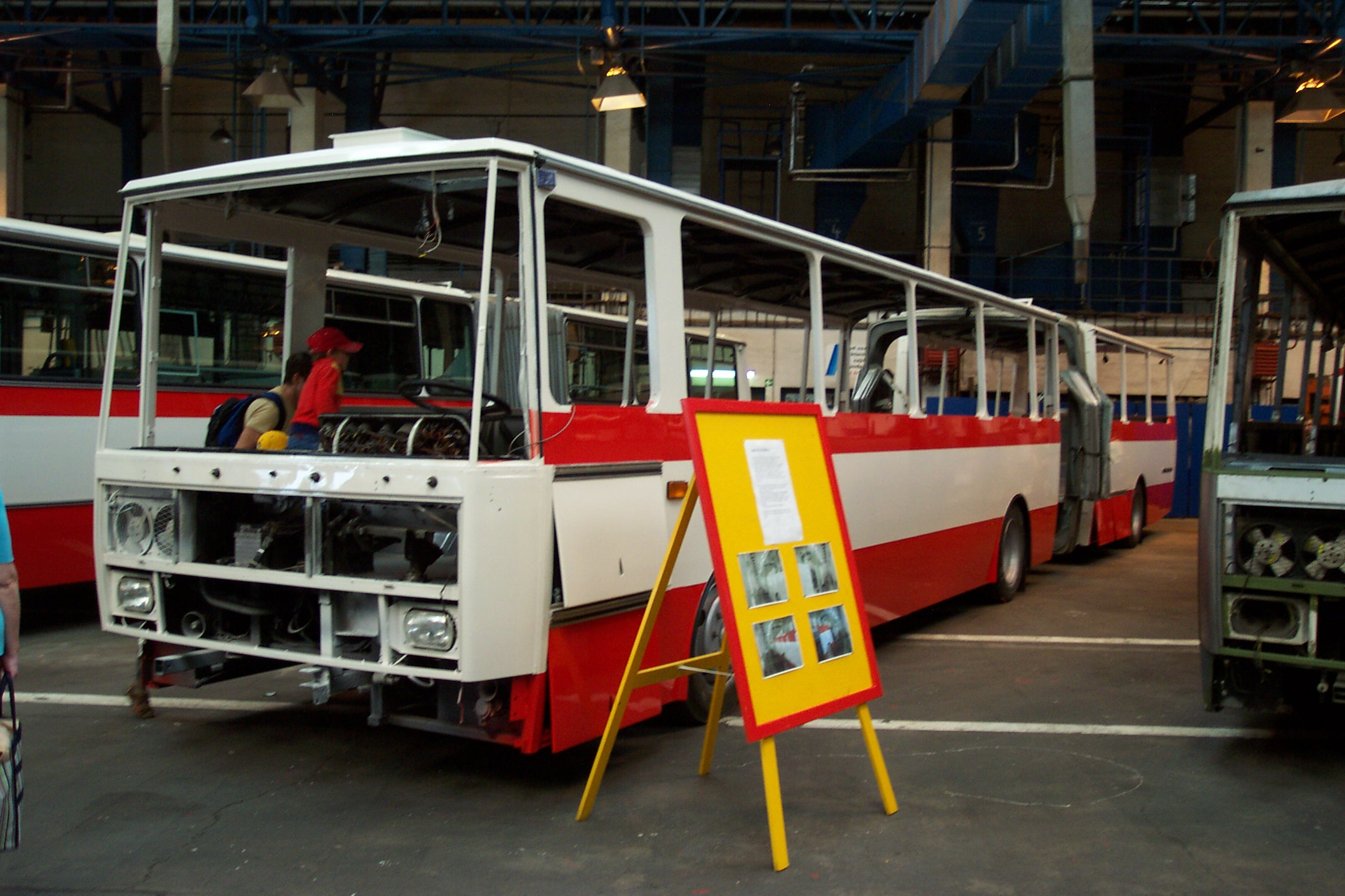 Bus type Karosa B 741 under reconstruction - Autobus typu B 741 procházející opravou